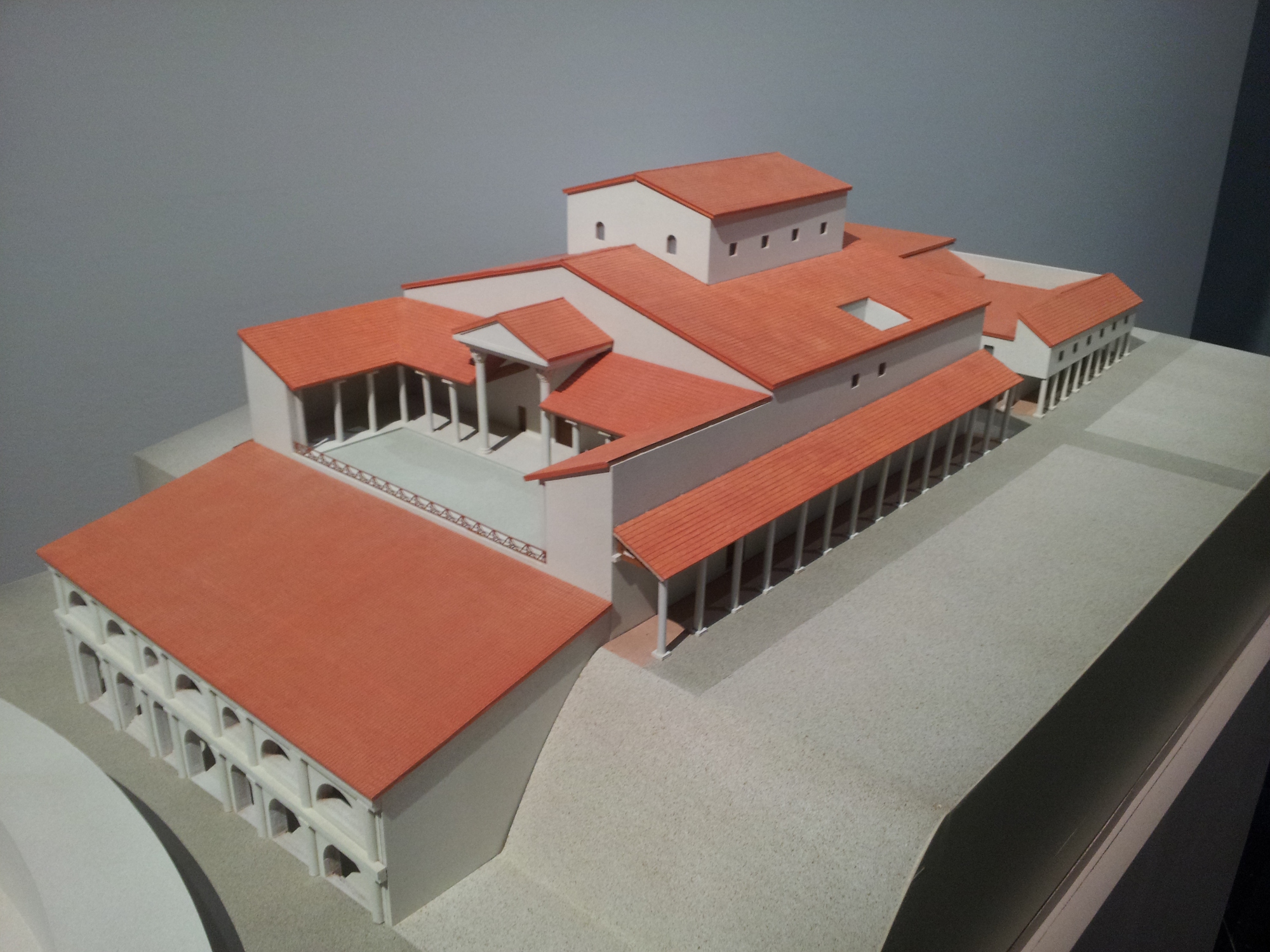 Palais de 230 m2 construit vers 20 avant J.-C. au sommet de la colline de Fourvière (Lyon, France) avec vue sur la plaine du Rhône et les Alpes. Atrium couvert de 190 m2, salle de bain chauffée et décoré de mosaïques. Sa date de construction correspond à la période où Agrippa, gendre de l'empereur Auguste, est gouverneur de la Gaule et séjourne à Lyon. L'empereur Claude y est peut-être né. Conception A. Debat, 2005. Avec l'aimable autorisation d'Hugues Savay-Guerraz, directeur de Lugdunum - Musée et théâtres romains.